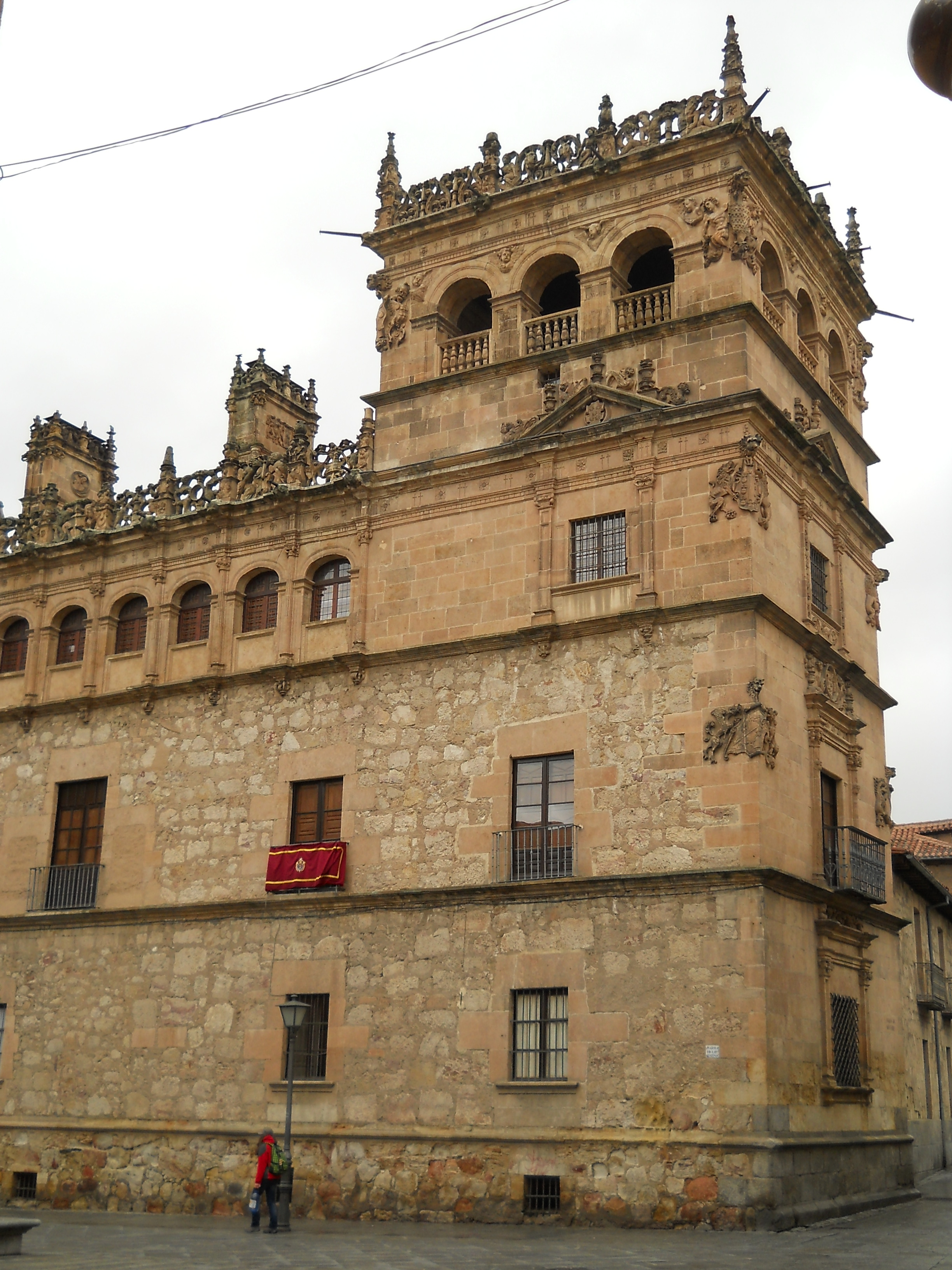 Palacio de Monterrey, Salamanca, España